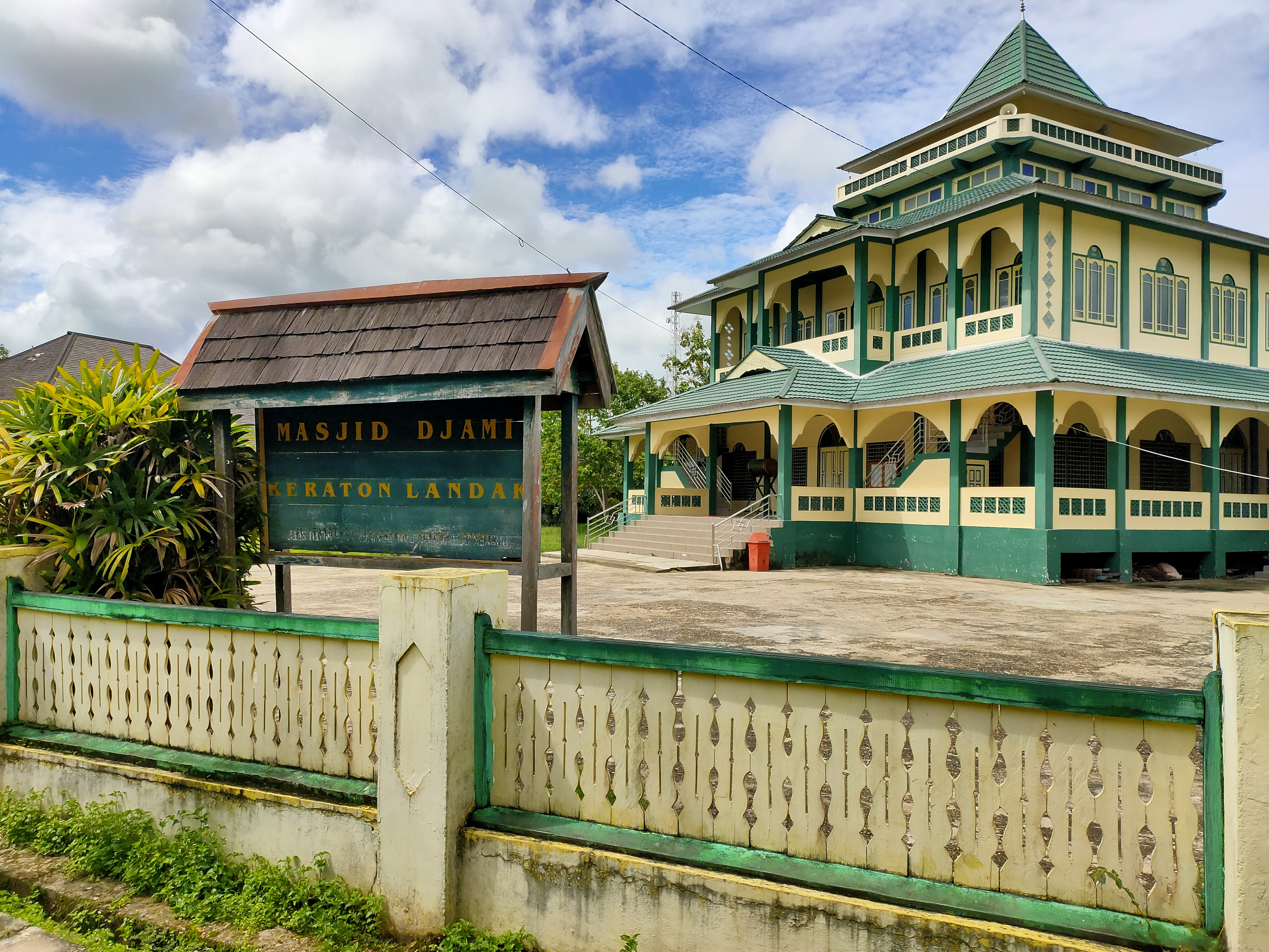 Masjid Djami Keraton Landak berada di samping Keraton Ismahayana Landak